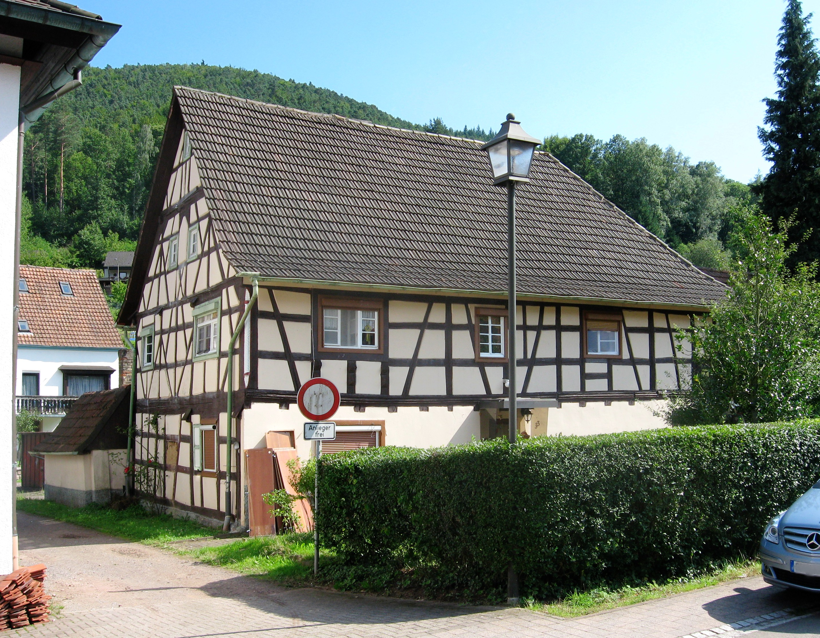 Lemberger Straße 3 in Nothweiler, Baudenkmal